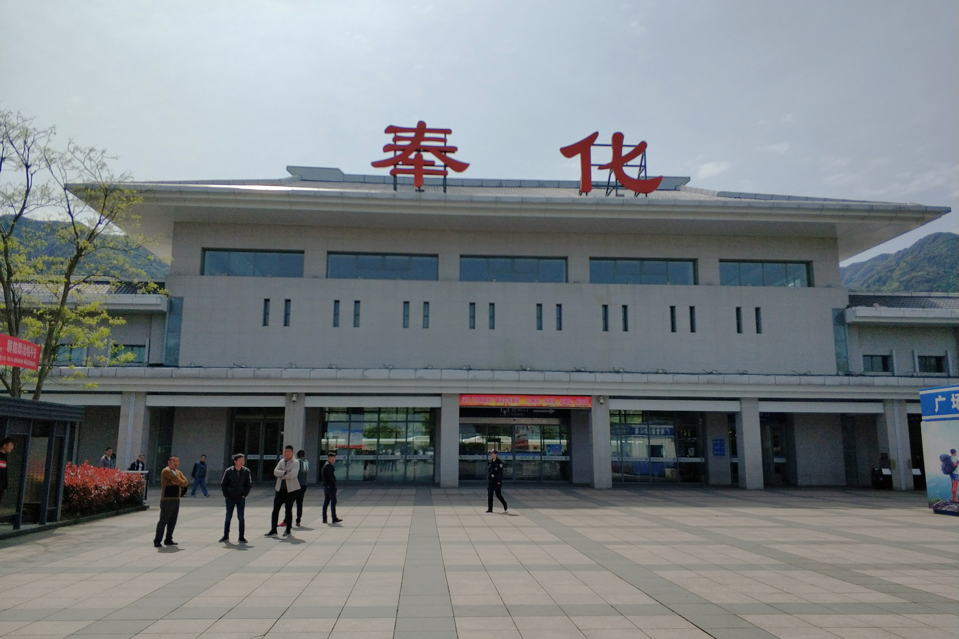 奉化火车站